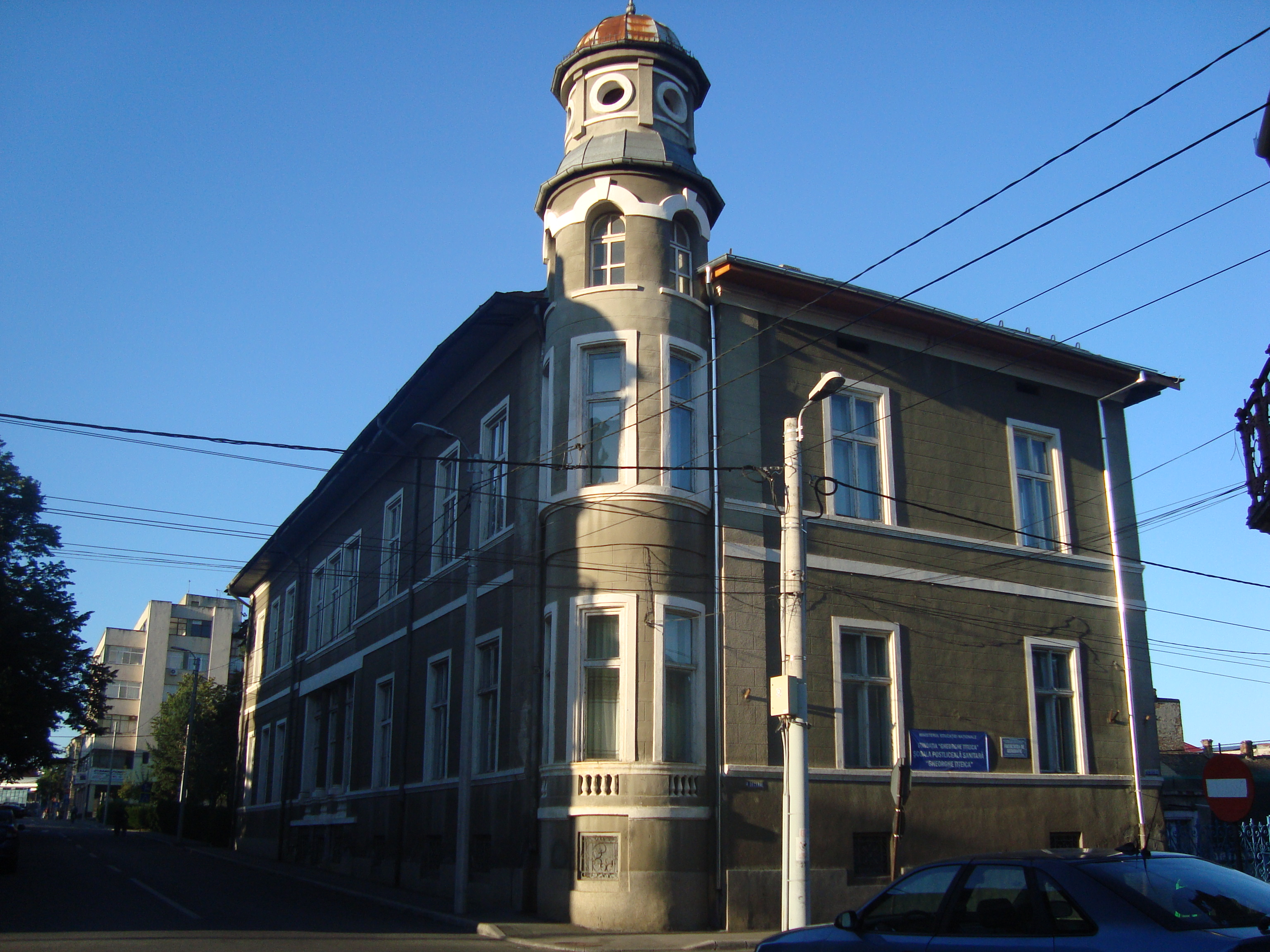 Scoala veche